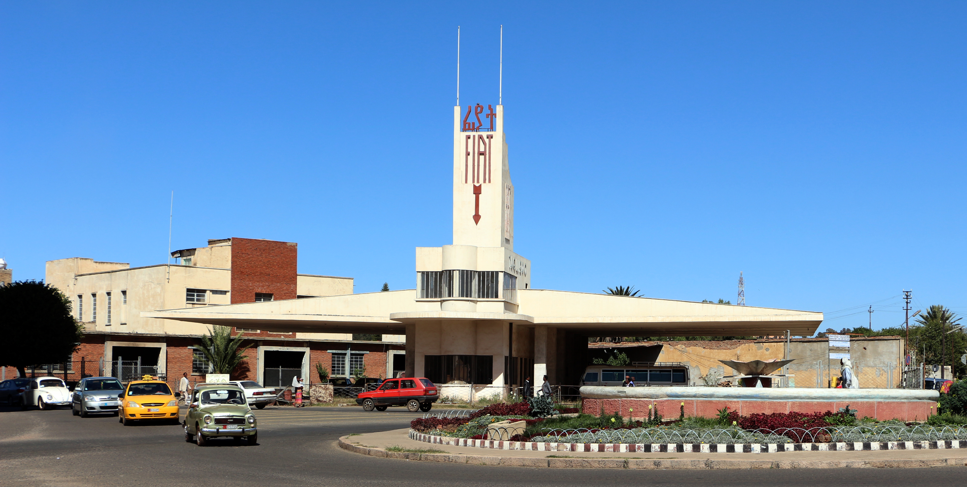 Fiat tagliero, 07,1.JPG